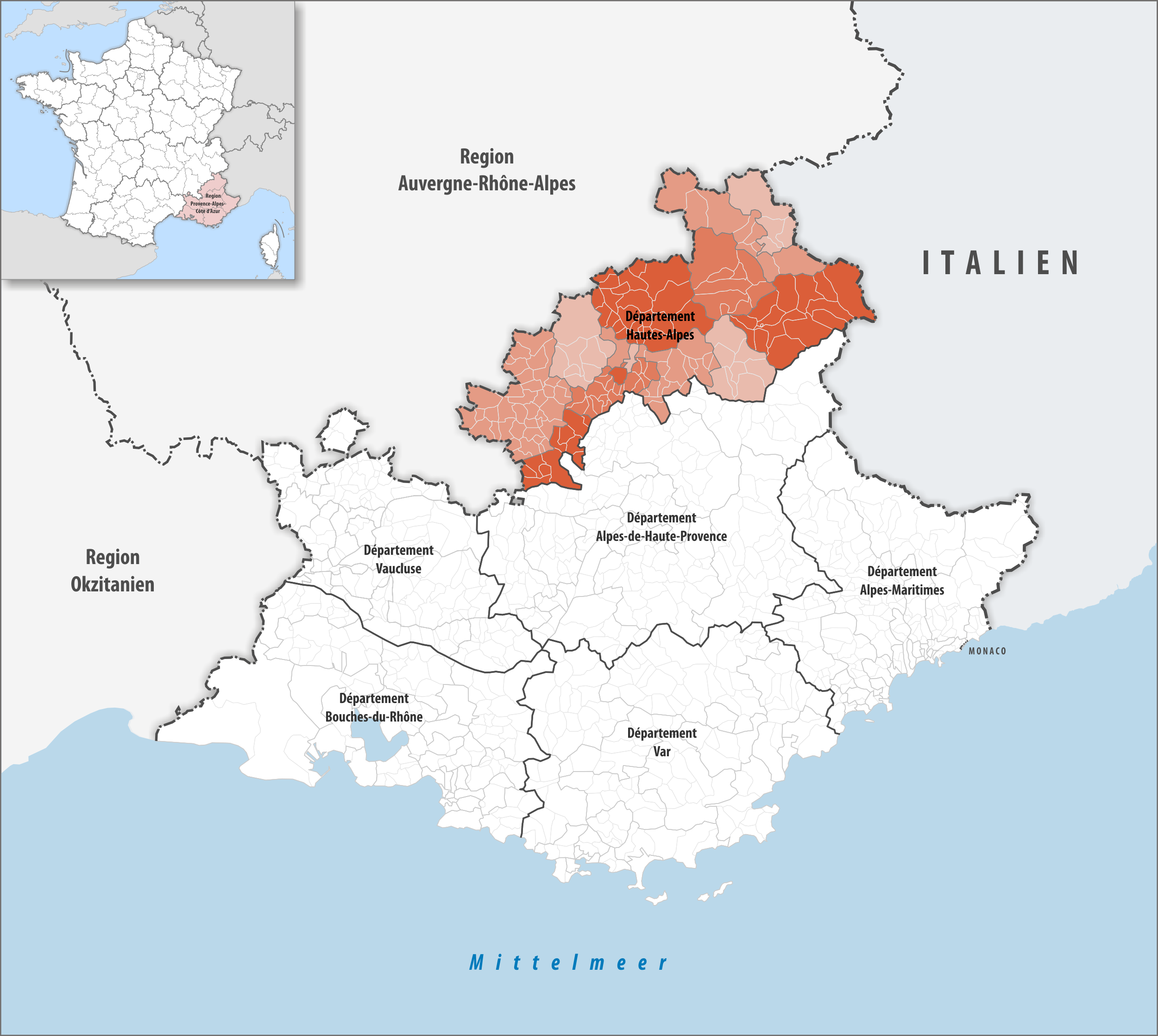 Lage des Departements Hautes-Alpes